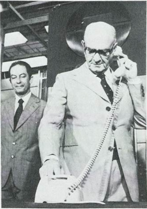 O governador do Rio Chagas Freitas durante telefonema para o Cardeal D. Eugênio Sales. A ligação marcou a inauguração de três novas Centrais Telefônicas da Telerj, com capacidade de atendimento de 26 mil terminais, localizadas nos bairros de Ipanema e Leme.